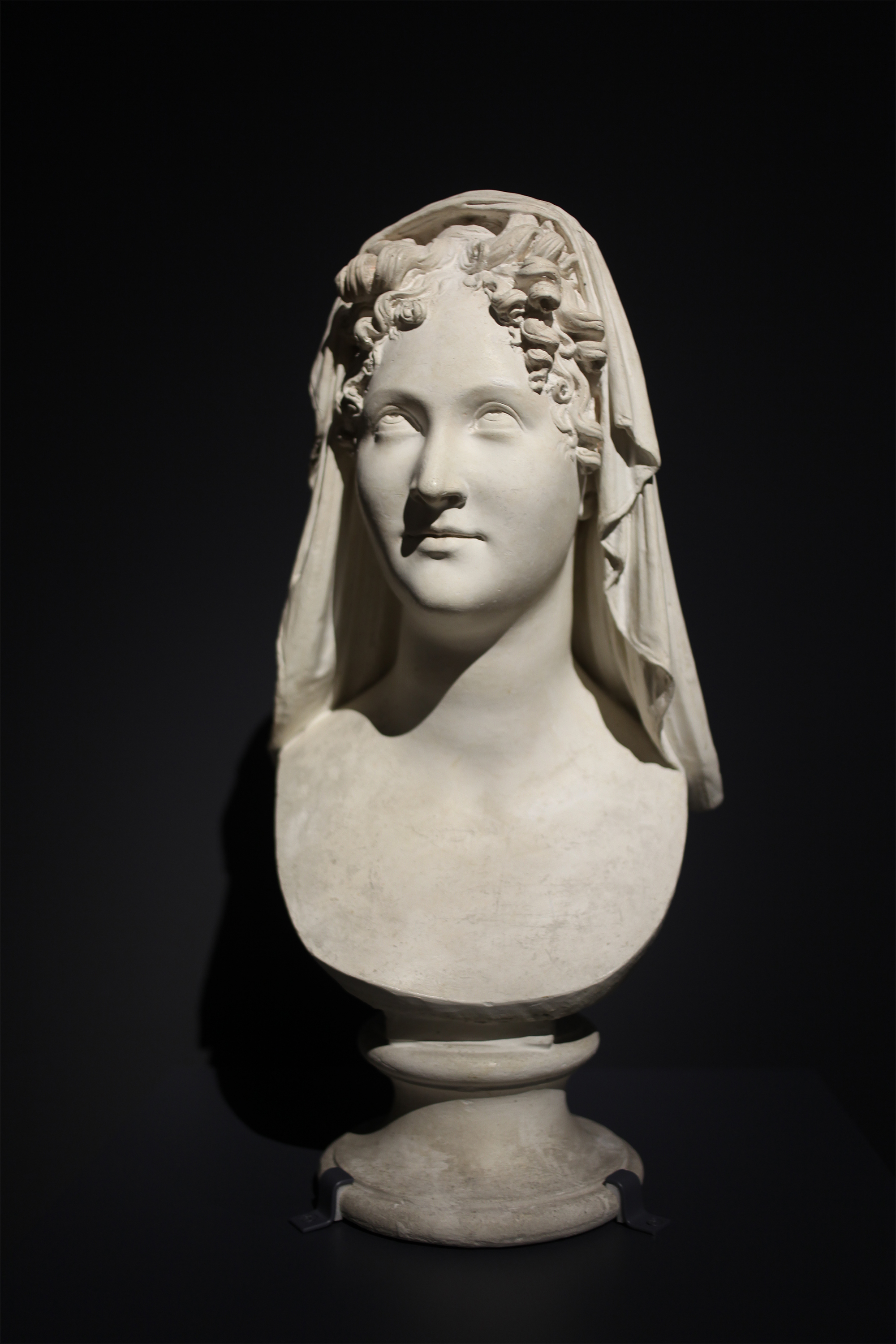 Antonio Canova (1757-1822) Juliette Récamier (1813-1822), gesso. Possagno, Fondazione Canova, Gypsotheca e Museo Antonio Canova. Fotografata alla mostra "Canova-Thorwaldsen" presso le Galleria di Italia di Milano.